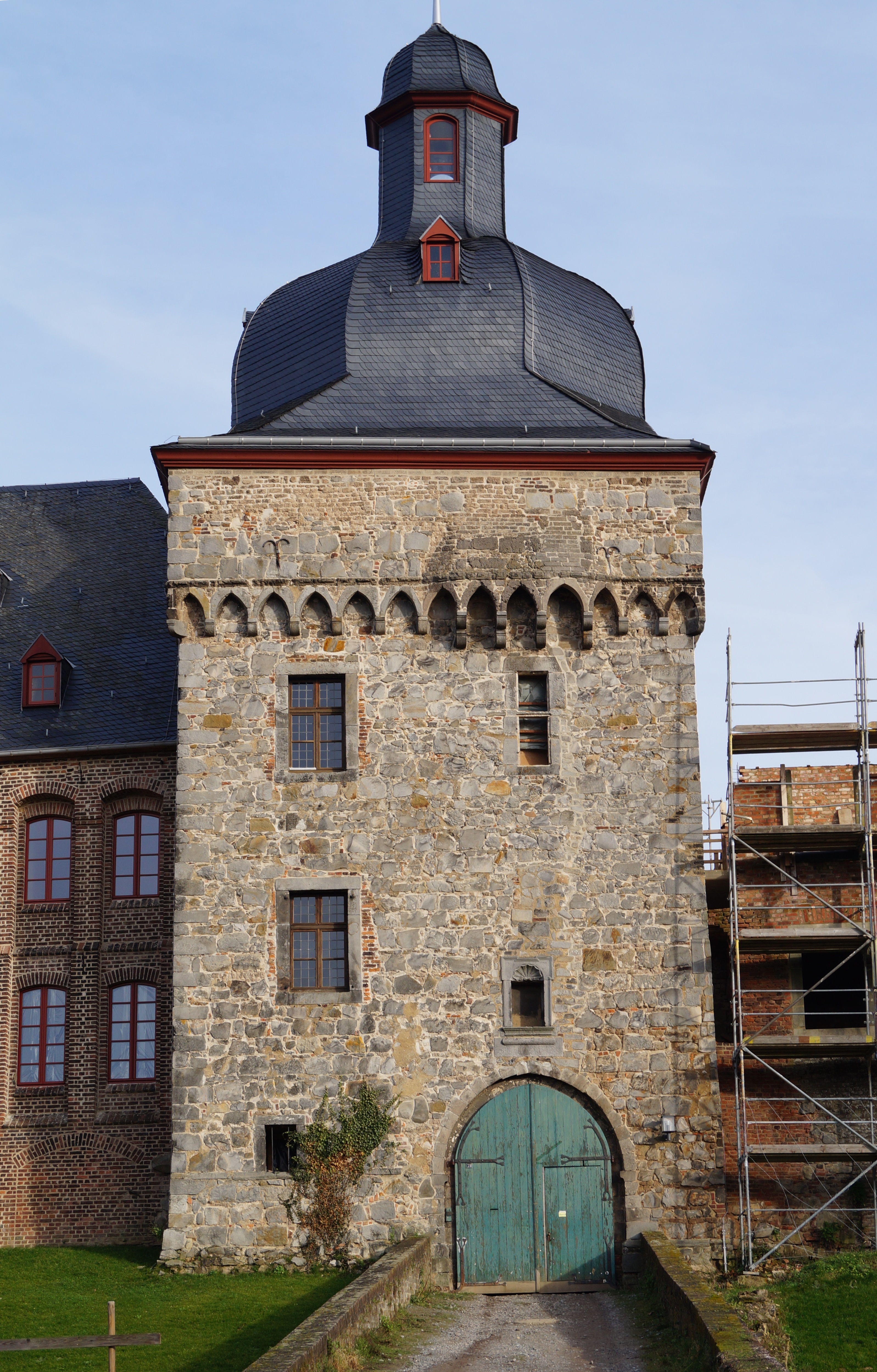 Schloss Liedberg